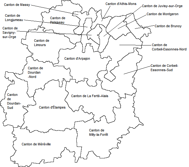 Carte des cantons de l'Essonne (91) en 1966.